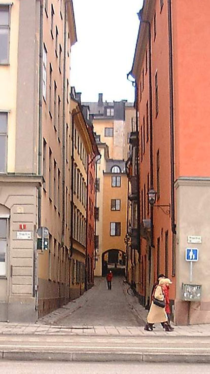 Ferkens Gränd, Gamla stan, Stockholm. Cropped.